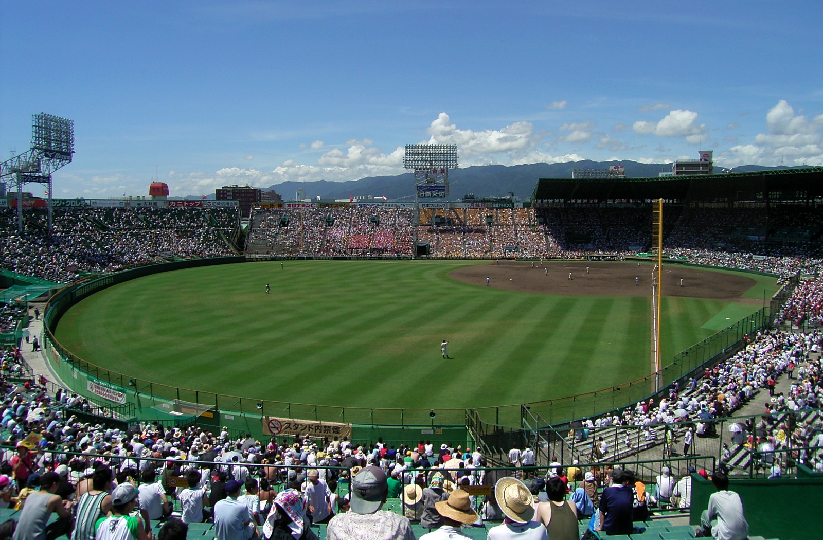 Hanshin Koshien Stadium